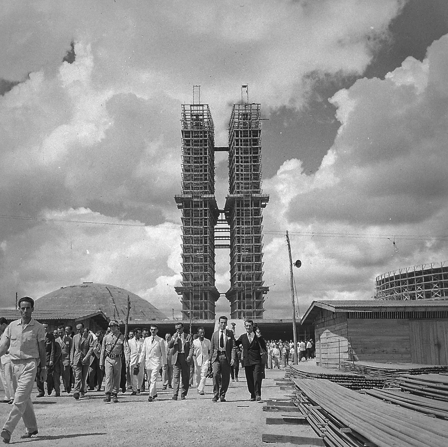 Obras de construção do Congresso Nacional, Brasília - Esplanada dos Ministérios - Congresso Nacional_5